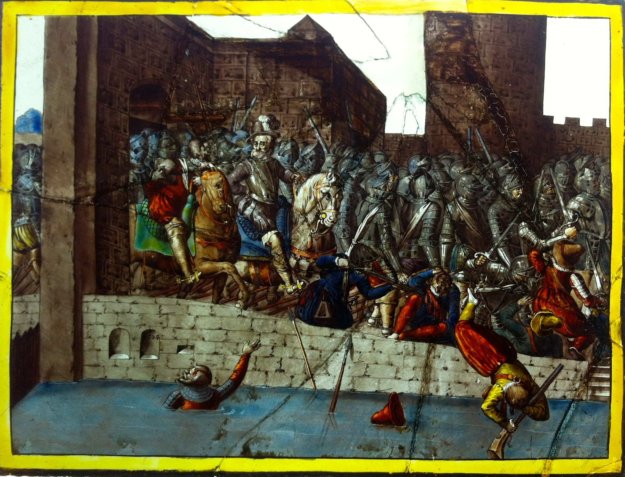 L'entrée d'Henri IV à Paris, d'après l’œuvre de Léonard Gaultier. Vitrail réalisé par Linard Gontier provenant de l'ancien hôtel des arquebuses de Troyes (XVIIe siècle), classé MH en 1904.